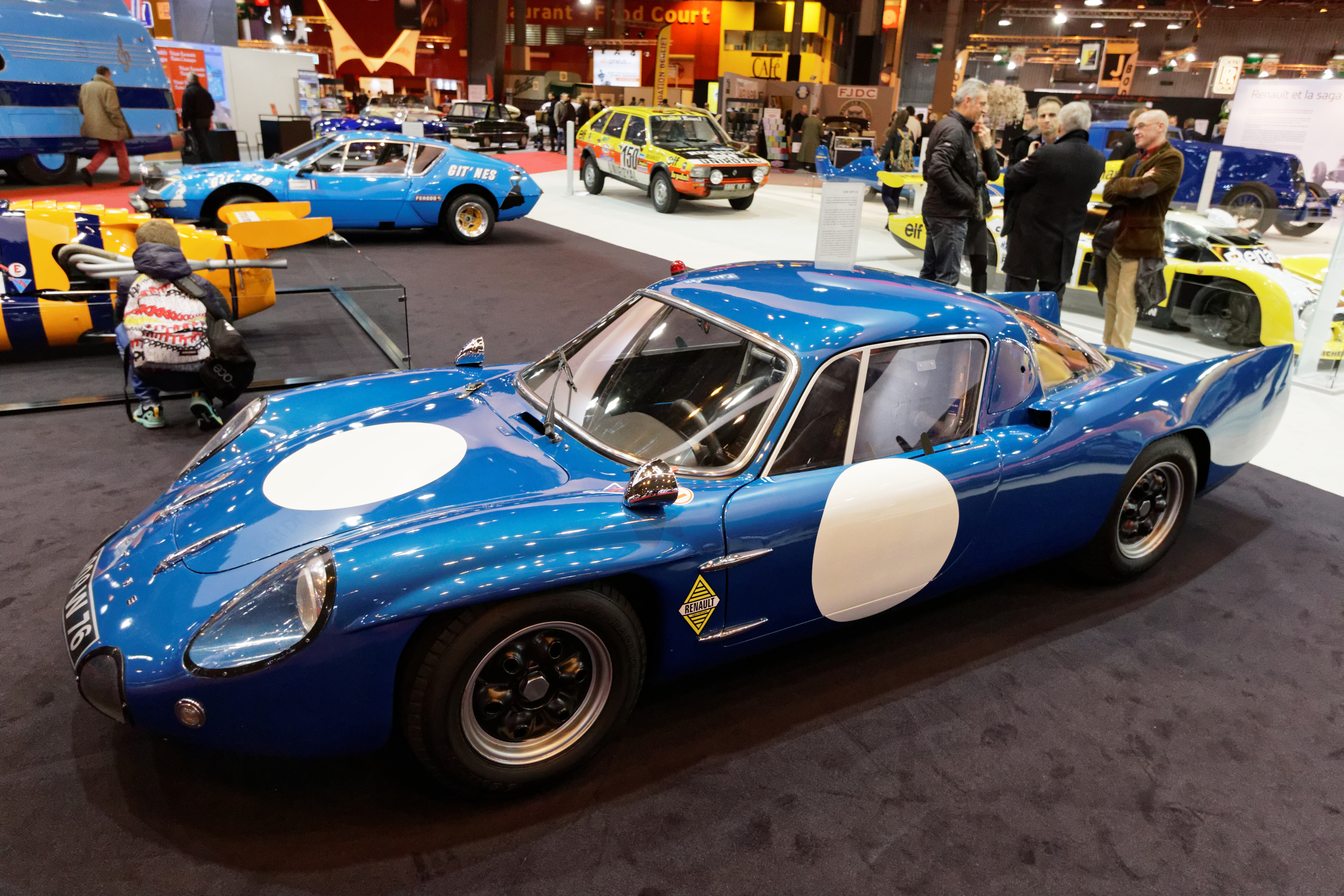 Une Alpine M65 de 1965 exposée lors du salon Rétromobile 2016.